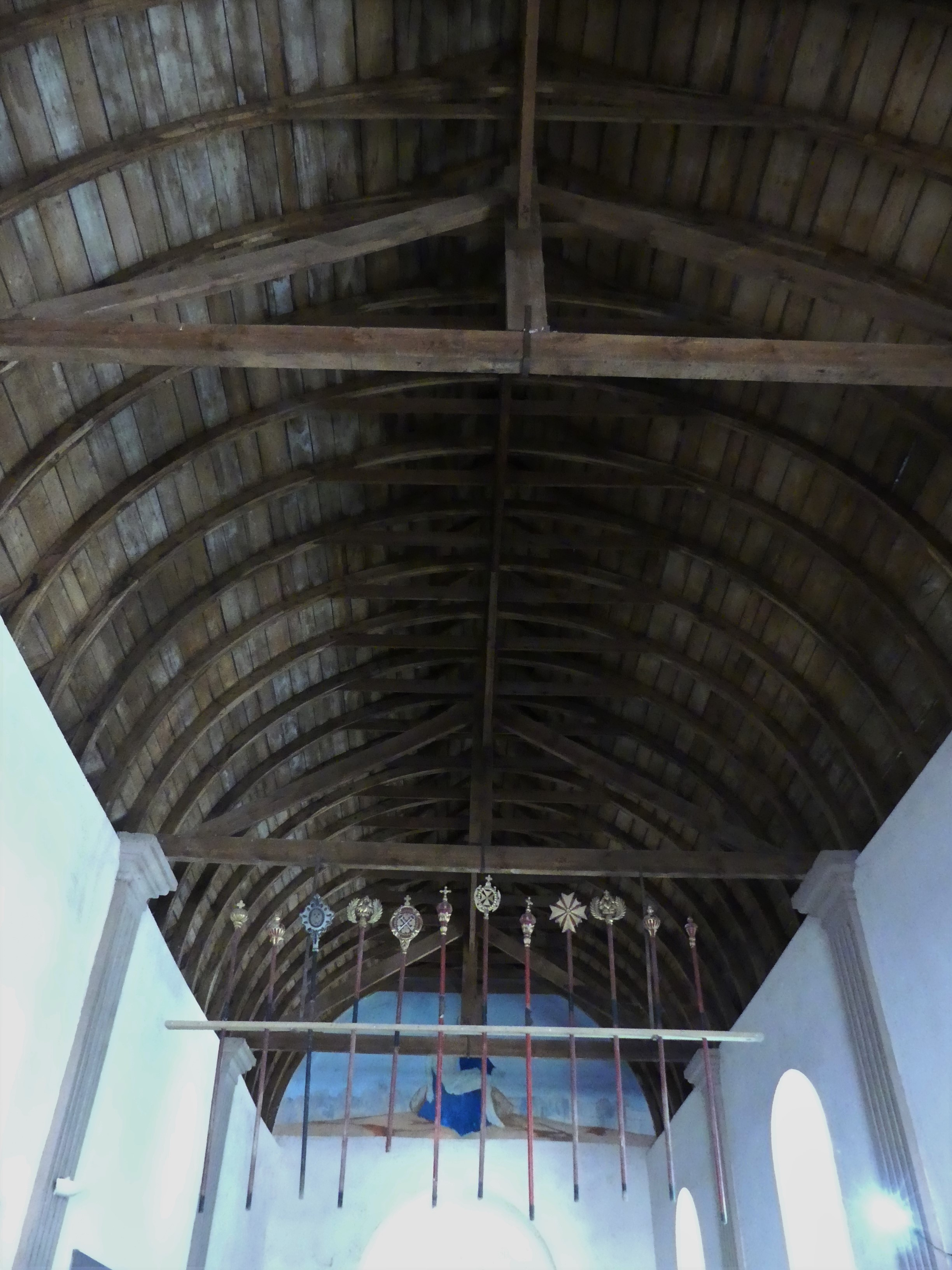 Le plafond de la chapelle des Pénitents, Saint-Côme-d'Olt, Aveyron, France.